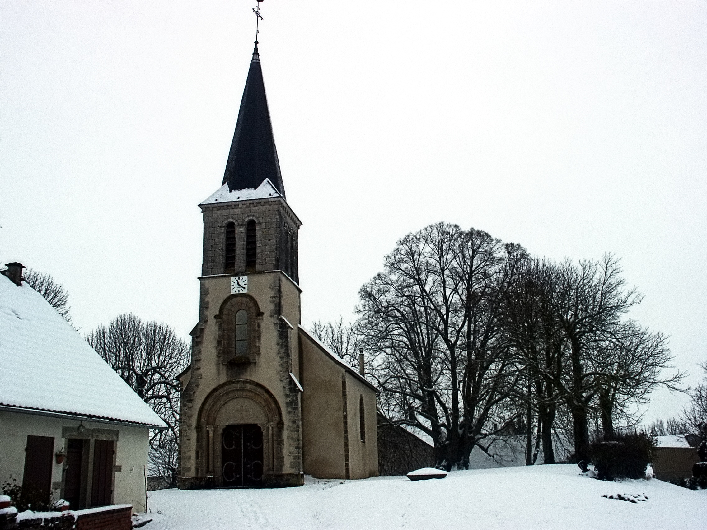 Photo de Veilly prise par moi-même en decembre 2004.